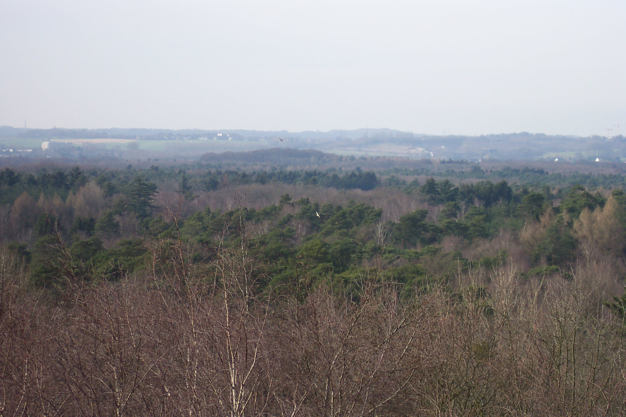 Hildener Heide, Hilden